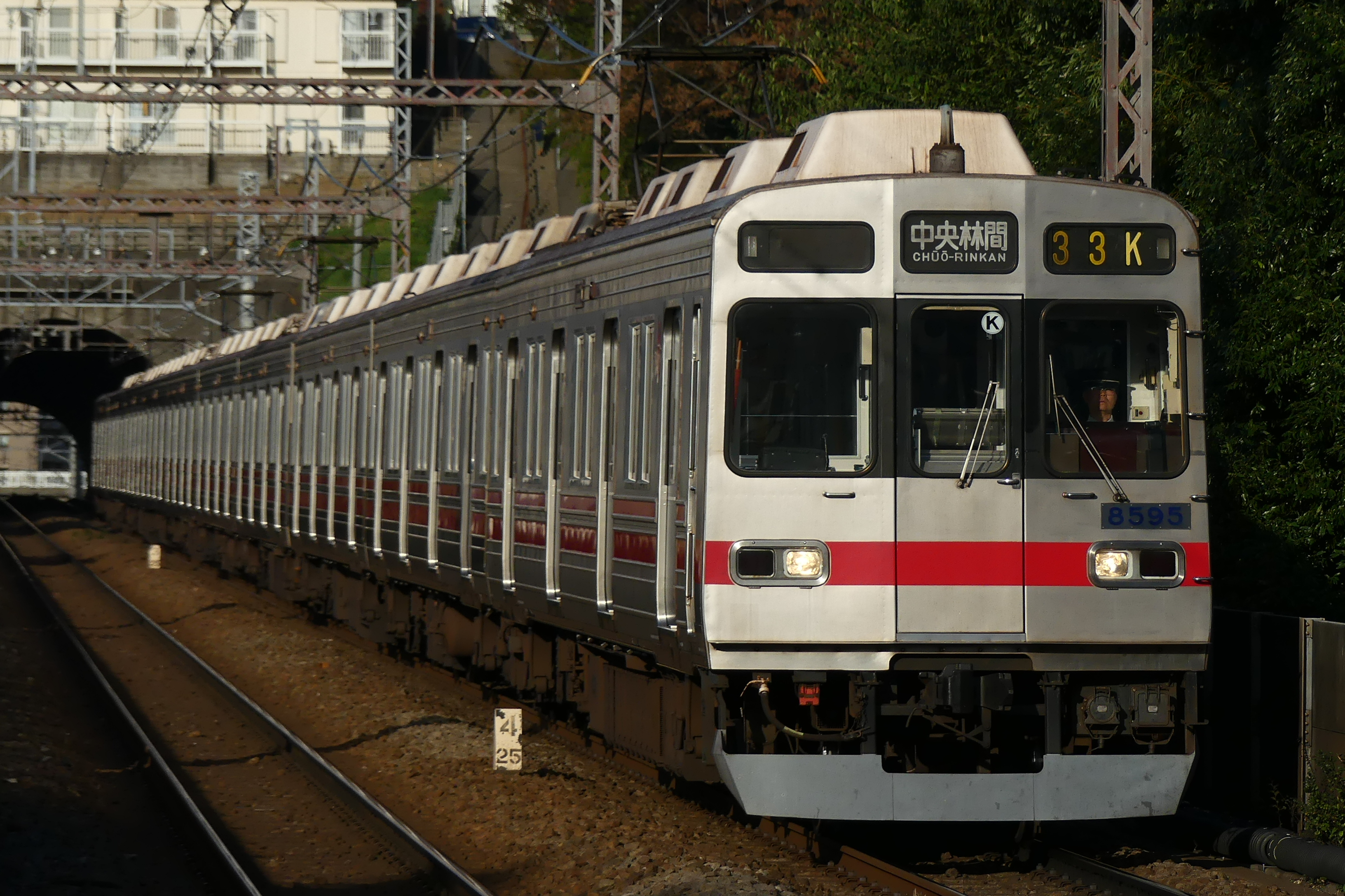 東急電鉄8590系電車